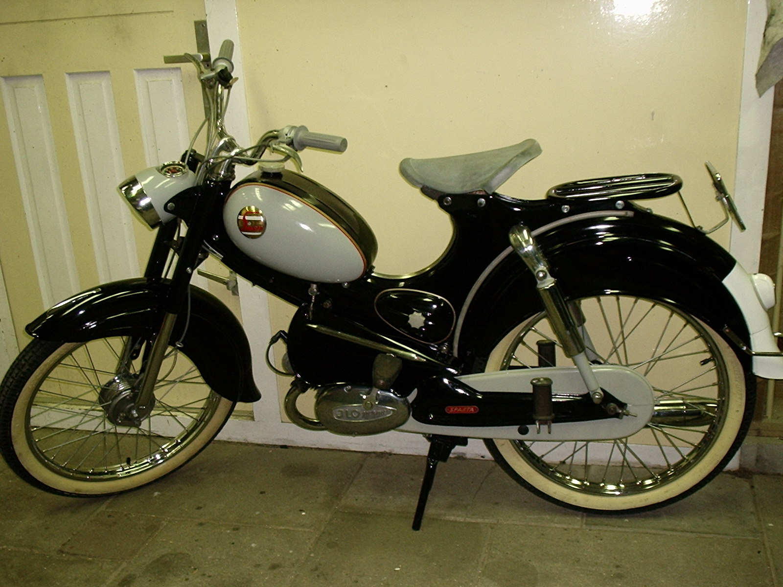 Sparta GB50 from 1957, engine JLO 49cc, owner PaulPower, Netherlands